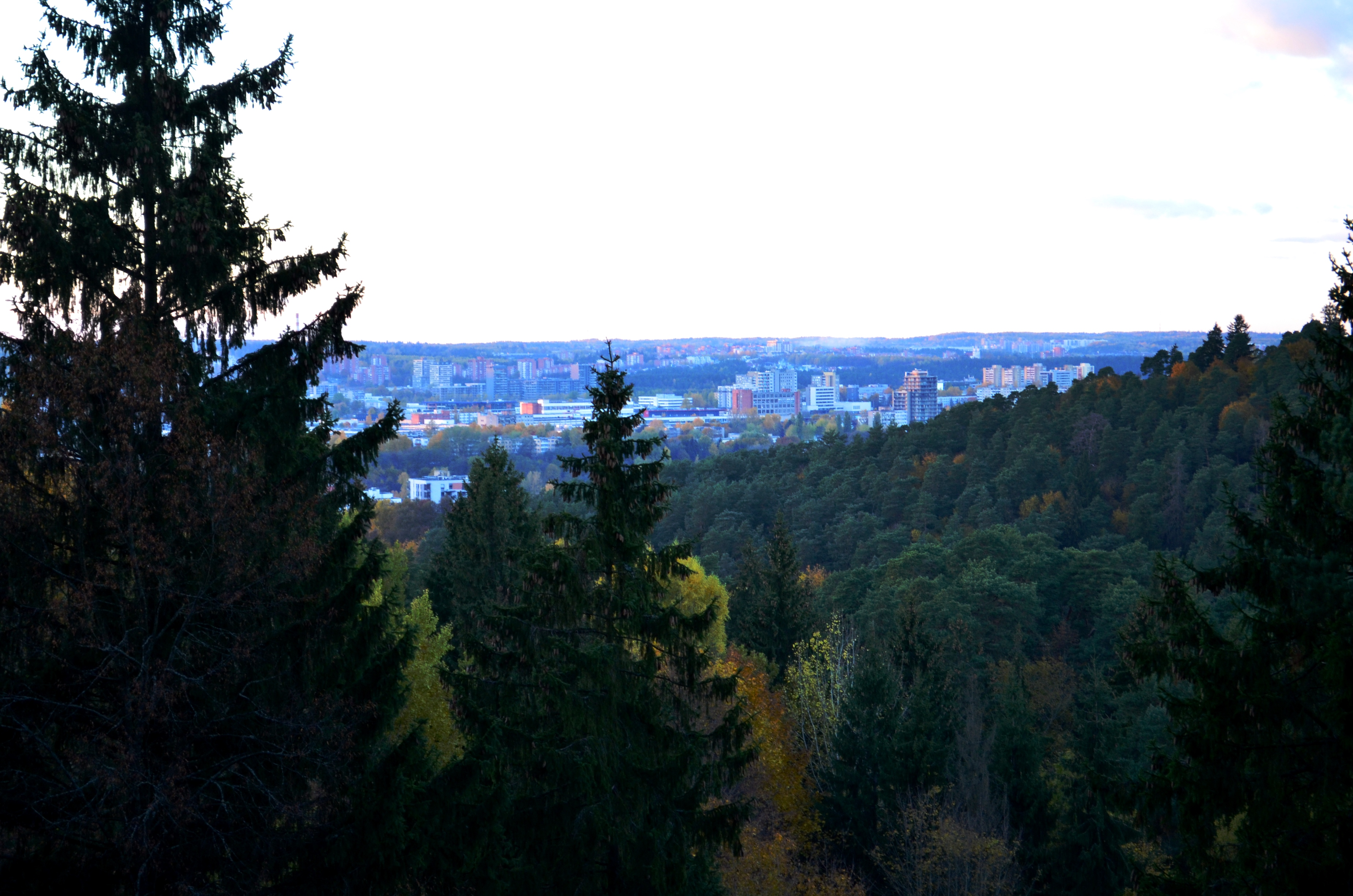 Reginys į Antakalnį ir Žirmūnus nuo Pavilnių RP miškų; Vilnius